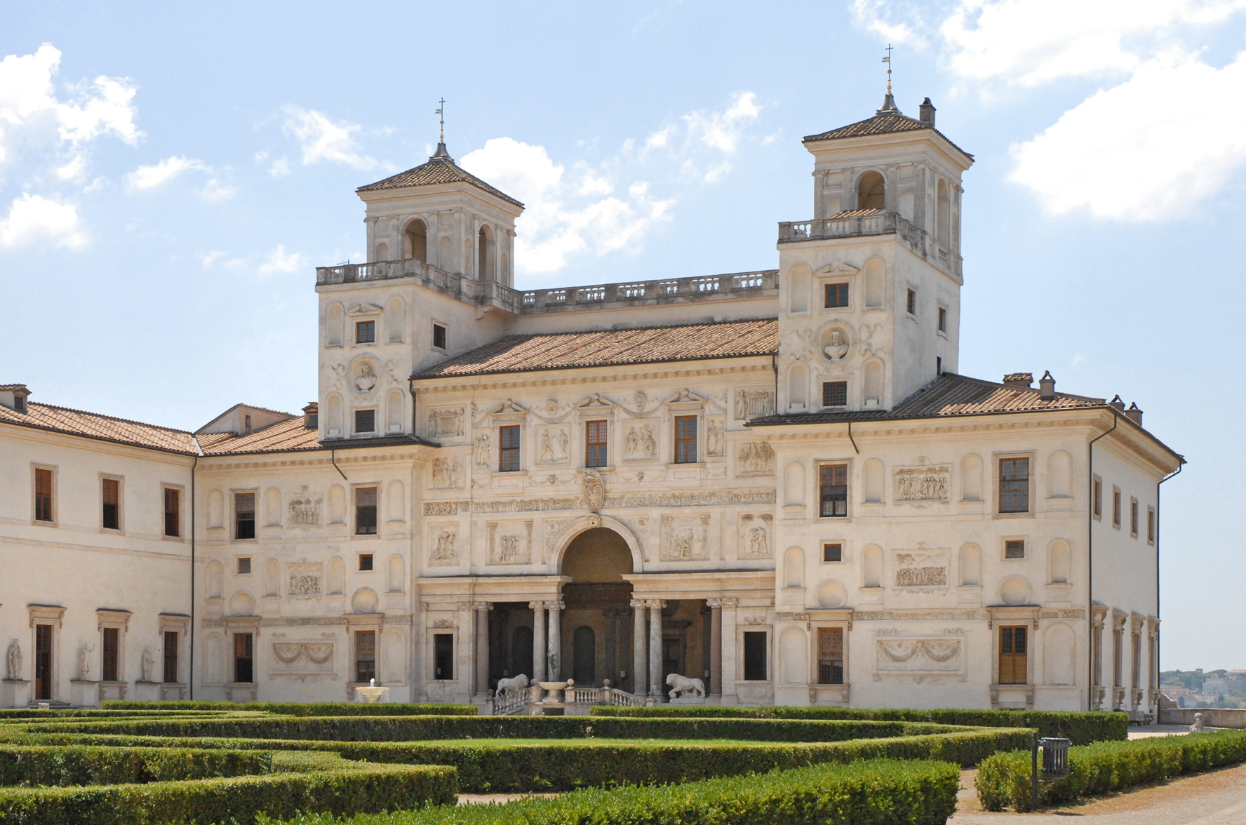 L'Académie de France, créée par Louis XIV en 1666, a été transférée à la ville Médicis en 1804, par Napoléon. La villa a été restructurée en 1564 pour le compte du Cardinal Giovanni Ricci di Montepulciano avant de devenir la propriété des Médicis. Elle dépend aujourd'hui du ministère français de la culture. Des artistes de toutes les disciplines y sont toujours accueillis en résidence et l'établissement organise des expositions et des manifestations culturelles. Le bâtiment est caractéristique des villas romaines du 16ème siècle, avec loggia, façade décorée d'éléments antiques, de statues et jardin à l'italienne avec allées, fontaines, sculptures, "studiolo". On peut visiter la villa et le jardin en groupe avec un guide. La villa Médicis est située sur la colline du Pincio, à proximité de l'église "Trinita dei Monti" et de la place d'Espagne, un des hauts lieux du tourisme à Rome, elle jouit d'une vue extraordinaire sur Rome (voir le panorama)